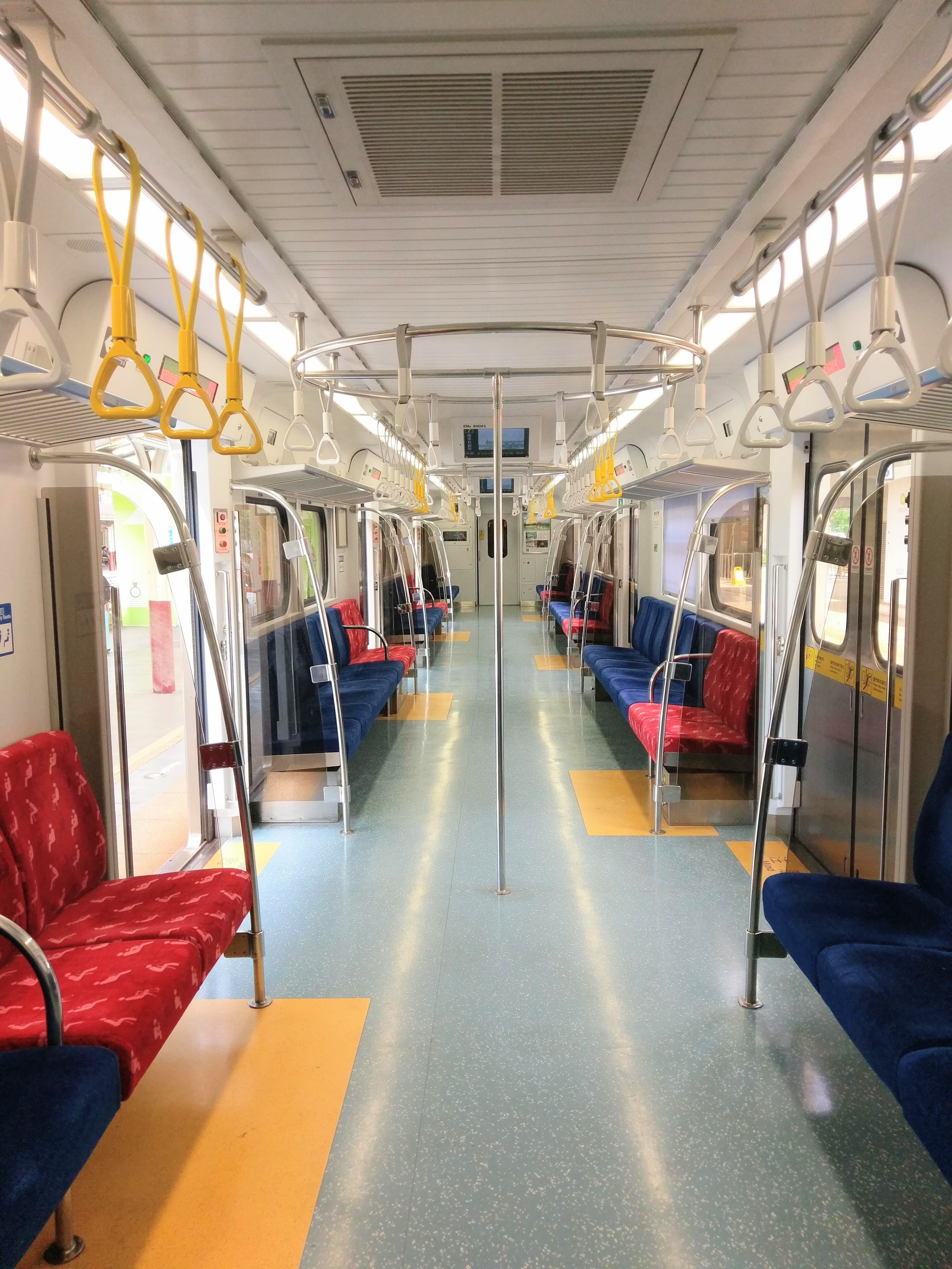 中文（台灣）: 台鐵EMU800型增備車EMA890車內配置